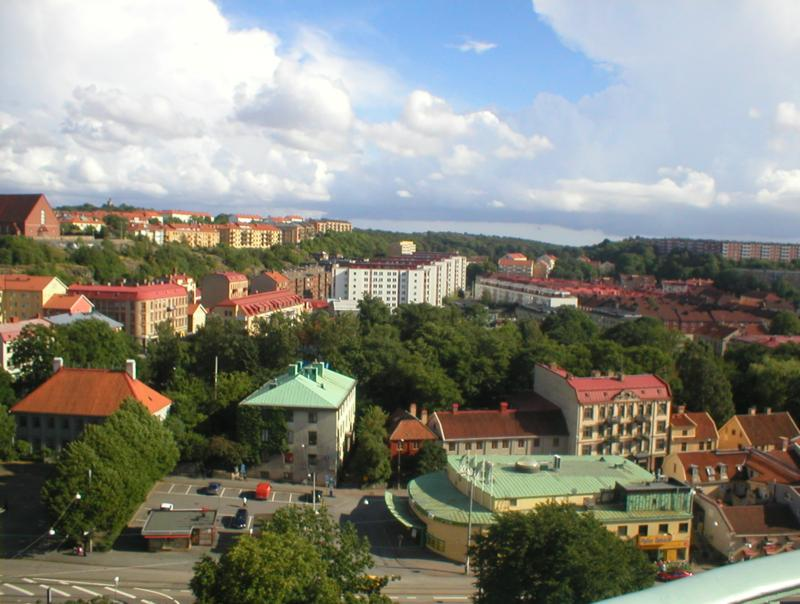 Majorna, Göteborg, med Stigbergstorget i förgrunden.